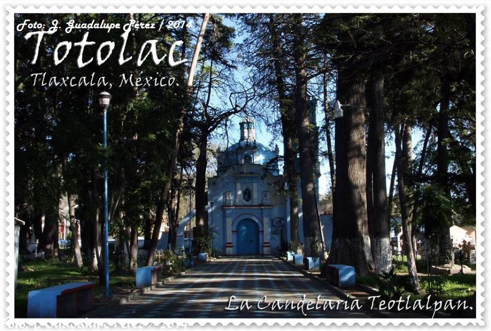 La Candelaria Teotlalpan This image contains digital watermarking or credits in the image itself. The usage of visible watermarks is discouraged. If a non-watermarked version of the image is available, please upload it under the same file name and then remove this template. Ensure that removed information is present in the image description page and replace this template with Metadata from image or Attribution metadata from licensed image . Caution: Before removing a watermark from a copyrighted image, please read the WMF's analysis of the legal ramifications of doing so, as well as Commons' proposed policy regarding watermarks. If the old version is still useful, for example if removing the watermark damages the image significantly, upload the new version under a different title so that both can be used. After uploading the non-watermarked version, replace this template with Superseded | new filename | version without watermarks .